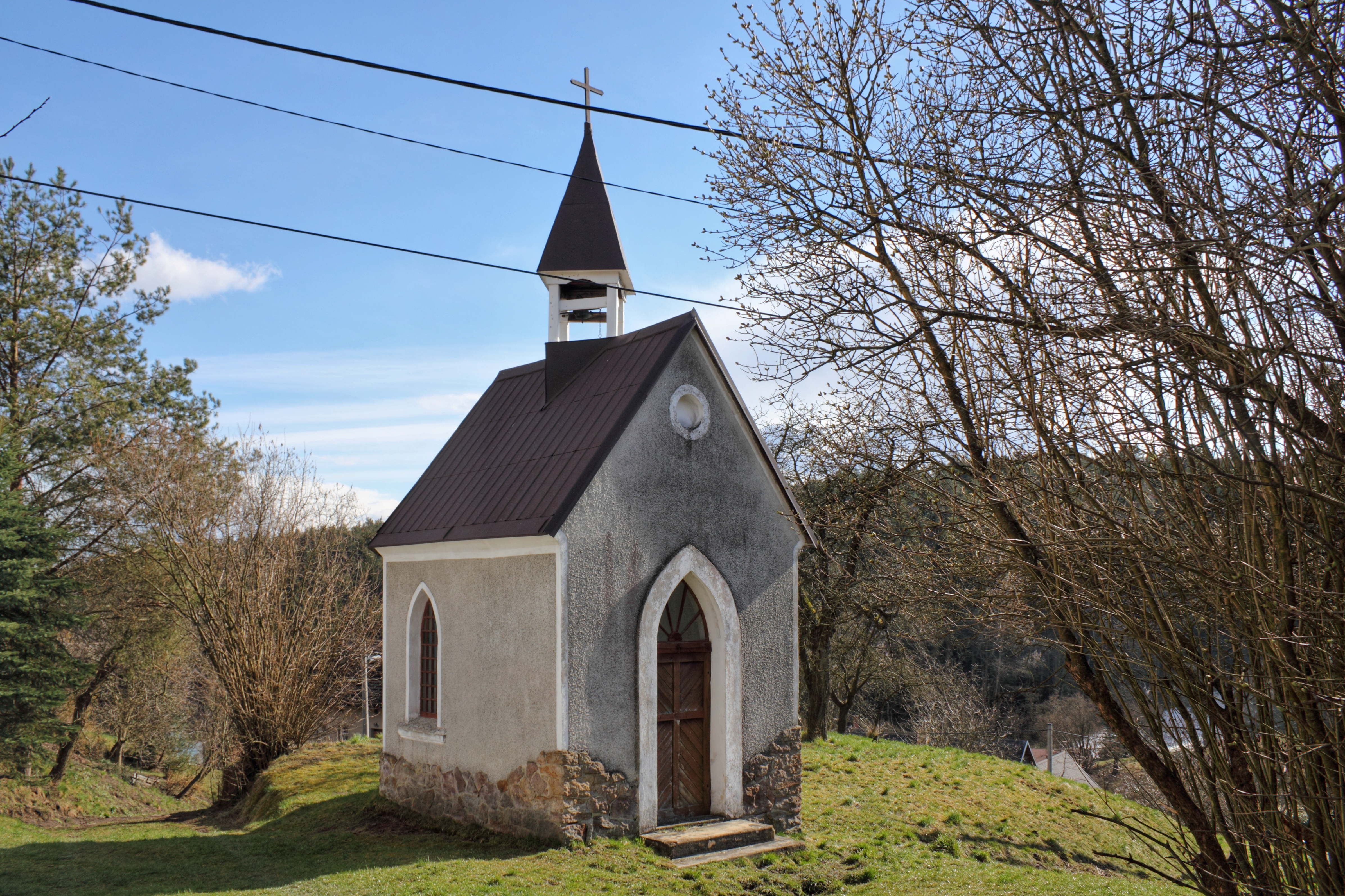 Chvalčovice (obec Bílá, okres Liberec)